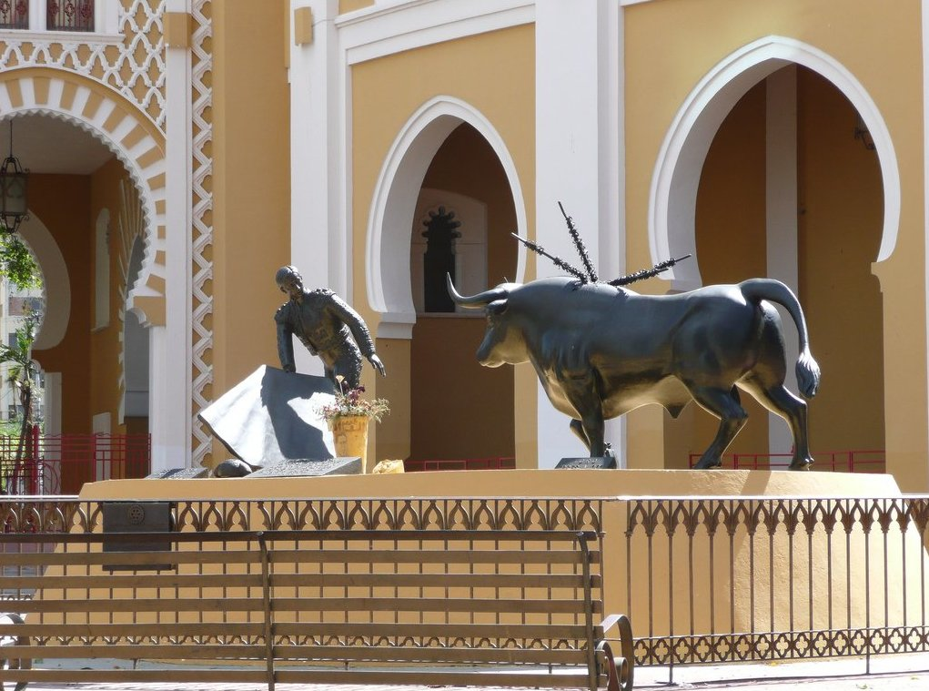 Estatua de César Girón, La Maestranza. Maracay, Estado Aragua, Venezuela. Arquitecto de La Maestranza: Carlos Raúl Villanueva.